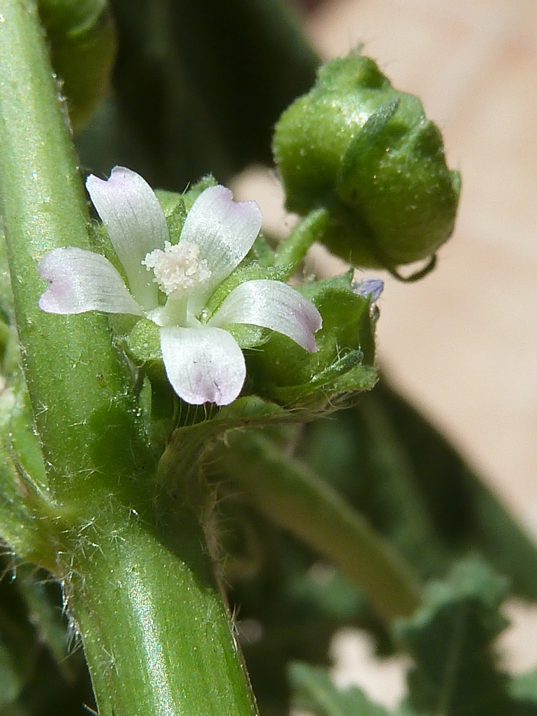 Malva parviflora (Malva, malva de flor chica): Inflorescencia axilar - Descampado c./San Antonio con Compositor Manuel Berná García, Albatera (Alicante, España).